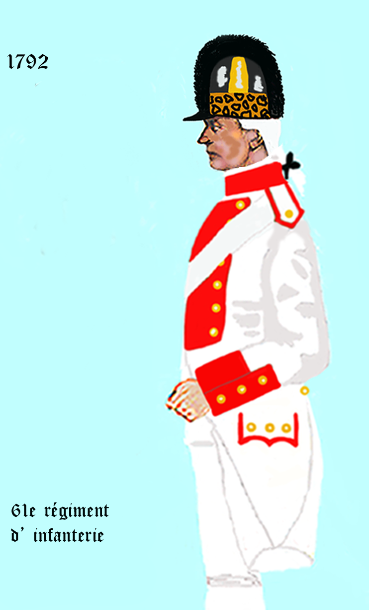 Uniform eines königlich französischen Infanterie-Regiments gemäß Dekret von 1792. - Entnommen und überarbeitet aus: „LES UNIFORMES ET LES DRAPEAUX DE L'ARMÉE DU ROI“ Marseille 1899.